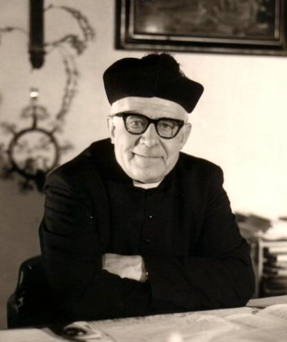 le Chanoine Albert Proost, directeur du Collège St Stanislas à Etterbeek. Bruxelles.